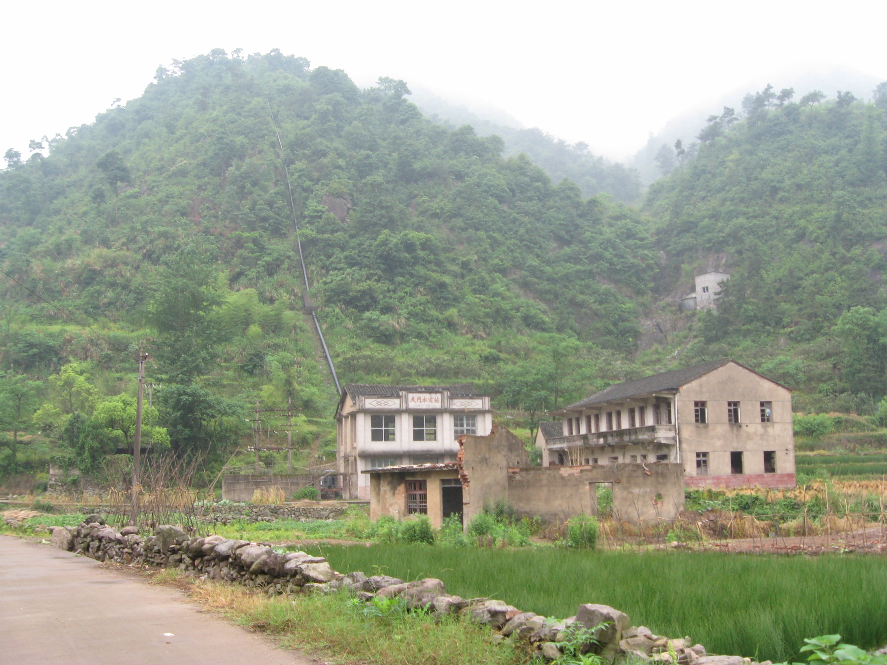 芹溪村天门水电站